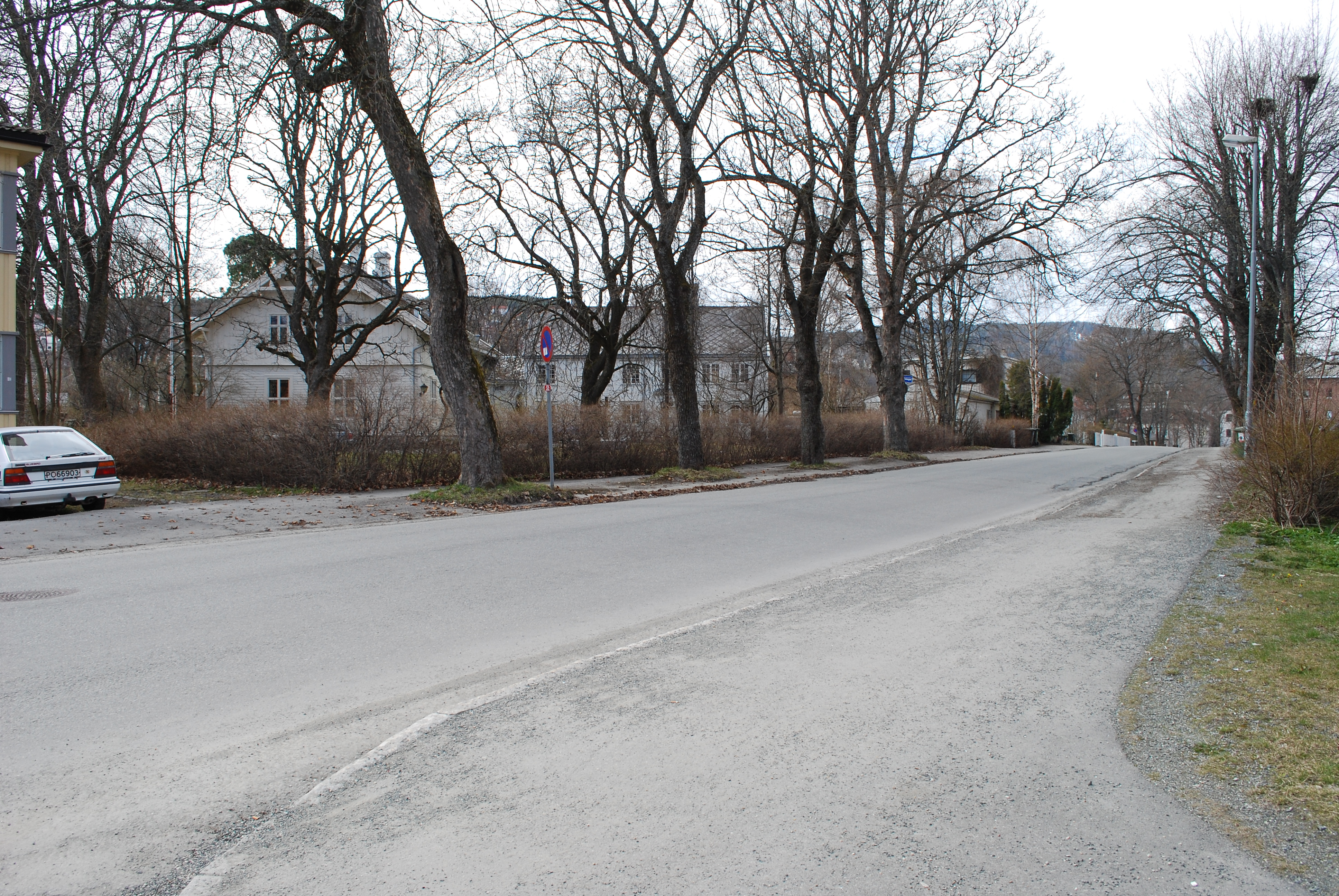 Klostergata og stedet hvor Helgeseter kloster en gang lå. Under gatenivå mellom Klostergata nr. 47 mot nr. 60 og 62.